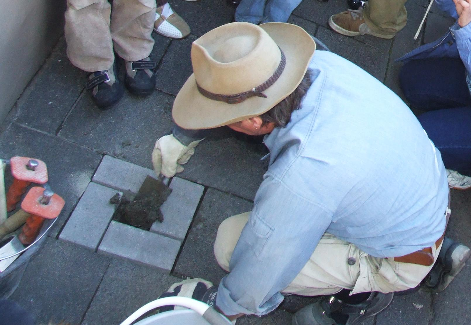 Gunter Demnig in Königswinter-Oberdollendorf bei der Verlegung eines Stolpersteins